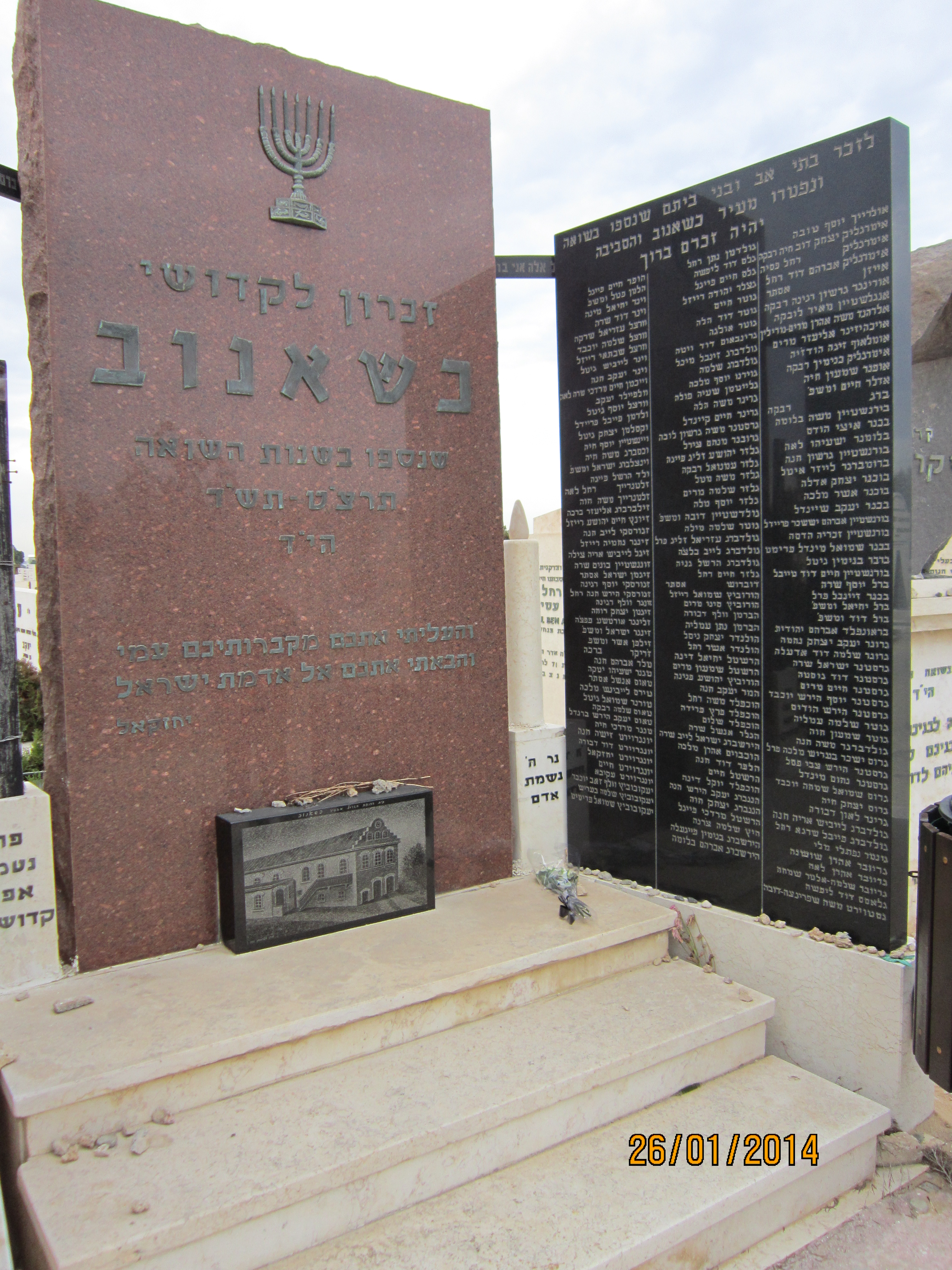 כשאנוב = מצבת-זיכרון עם שמות , בחולון ( צילום = הולנדר 2014 ) י